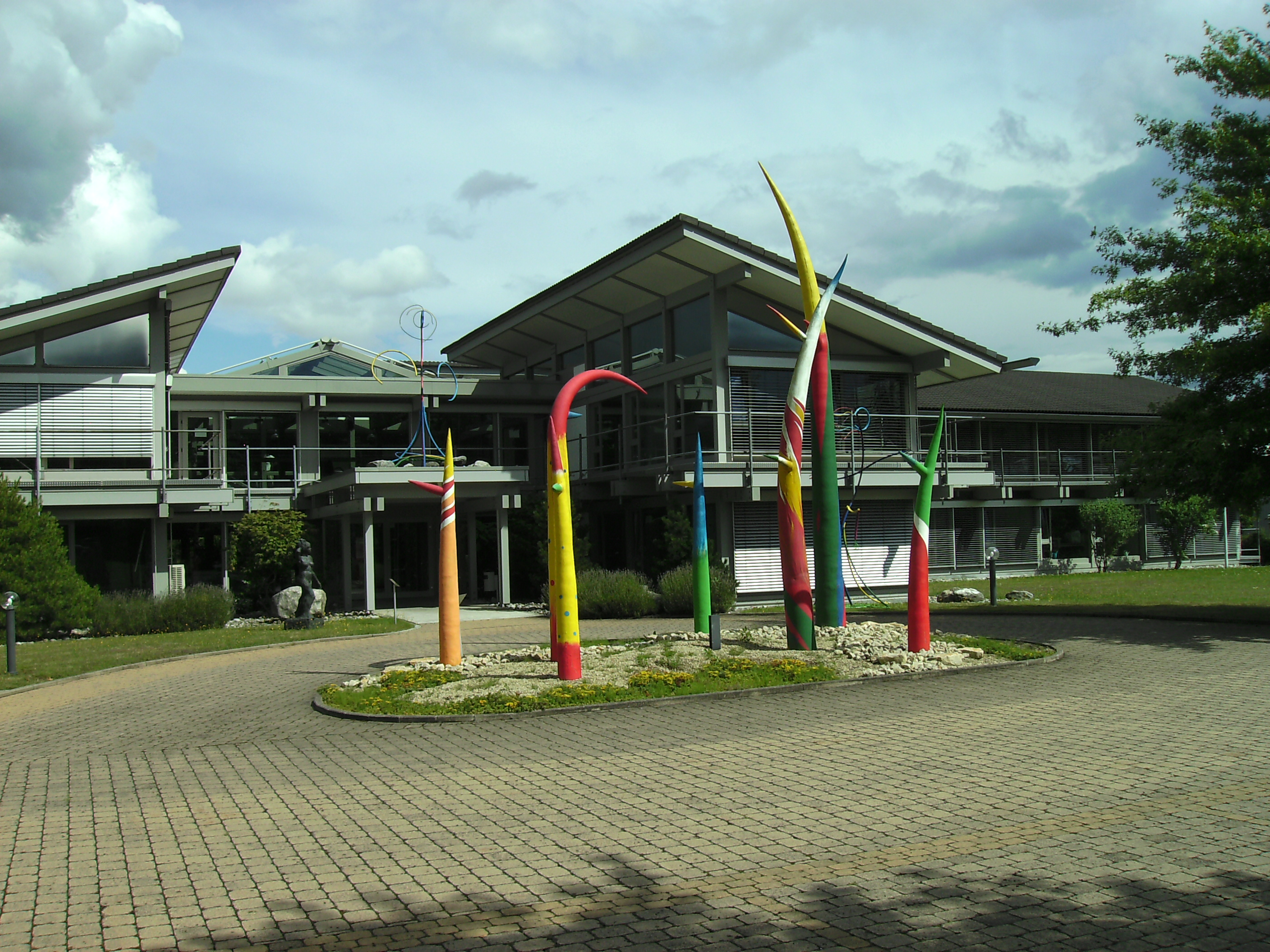 Kunstforum Leismann: Eingangsbereich